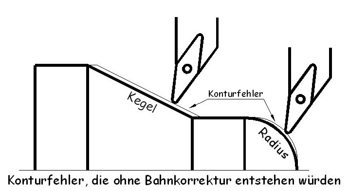 Entstehender Konturfehler am Werkstück ohne Bahnkorrektur selbst angefertigt 30.Sept.2005 Wilfried R. Seinig 82178 Puchheim bei München